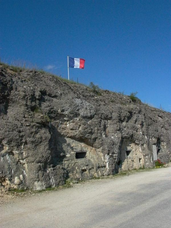 Zdjęcie przedstawiające zrujnowane przez ostrzał koszary szyjowe Fortu Vaux Twierdzy Verdun - miejsce zaciętych walk w czasie I Wojny Światowej. Autor: Zbigniew Strucki (2004)